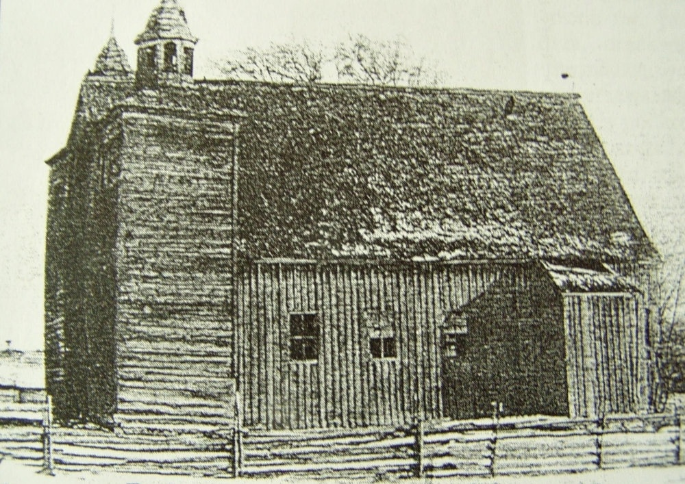 Pervalko bažnyčia apie 1900 metus.